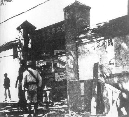 西南聯大121事件